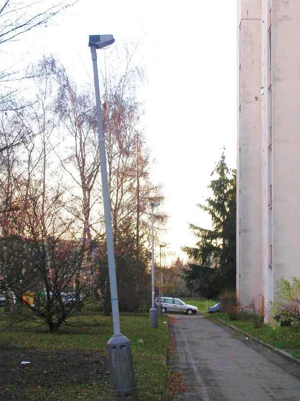 Sadové sloupy veřejného osvětlení. Praha, Zahradní Město, Sasanková ulice